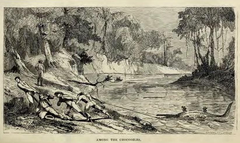 Ilustración de Kinnersley Johnson representando la caza del caimán en la obra de Páez (1868).